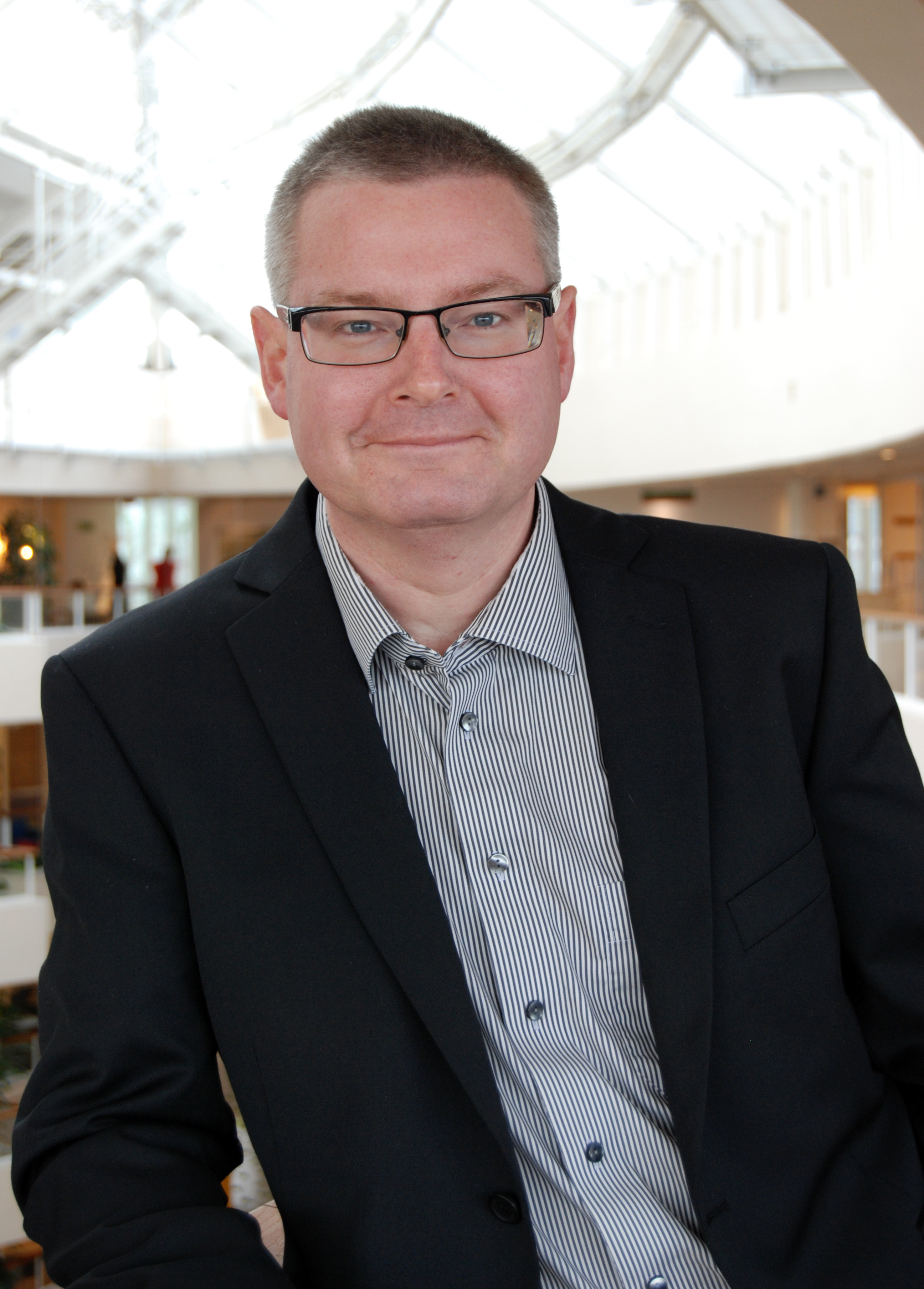 Jonas Ransgård 2013